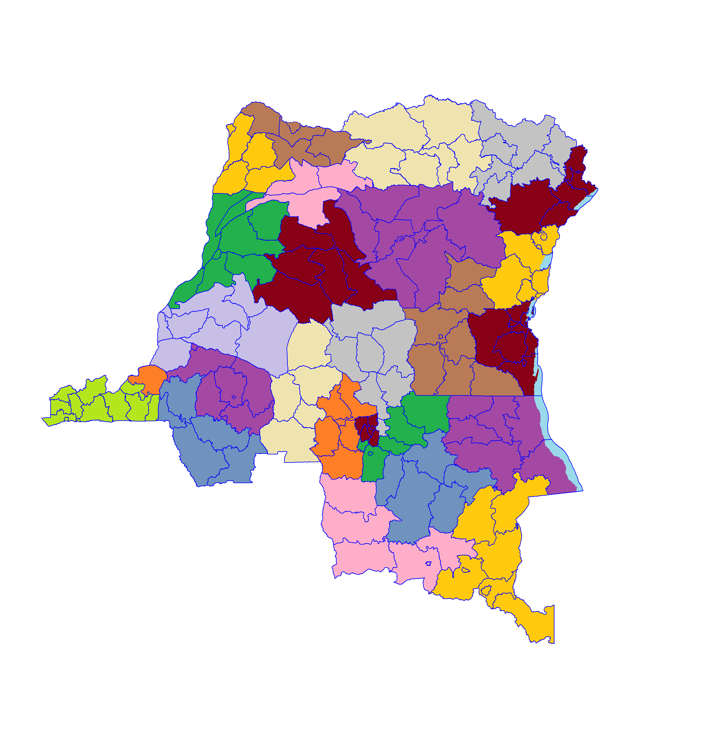 Mapa de los Territorios de la República Democrática del Congo por Provincia (2017)